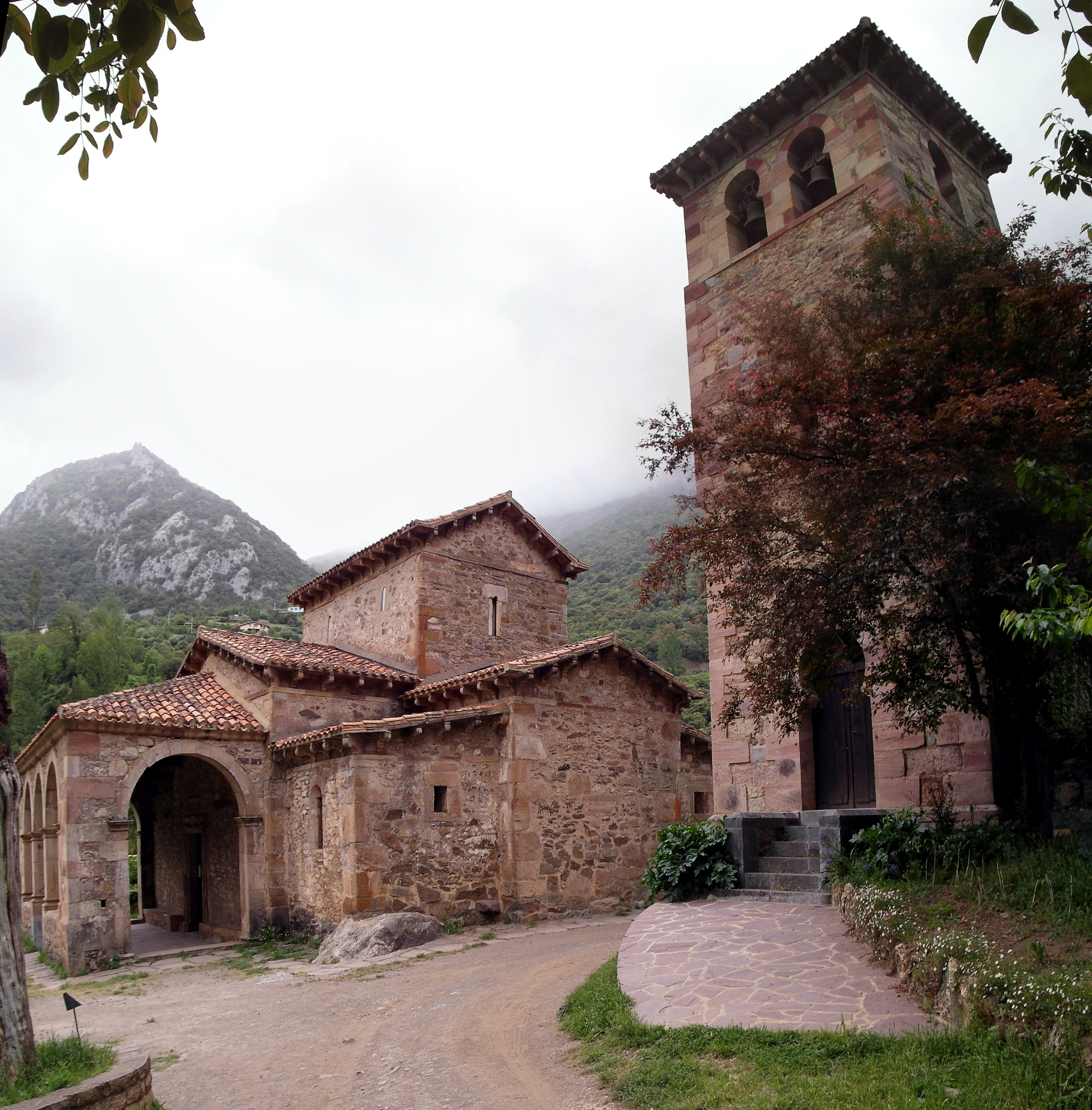 Iglesia de Santa María (Lebeña). 2012-05-18